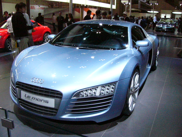 アウディ・ルマン・クワトロ 東京モーターショー2003にて撮影